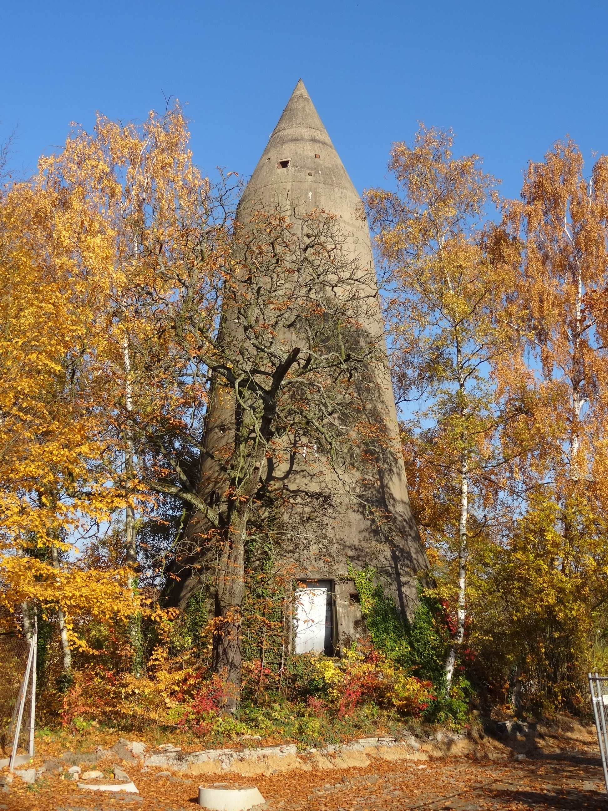 Winkelturm ehem. Bergkaserne